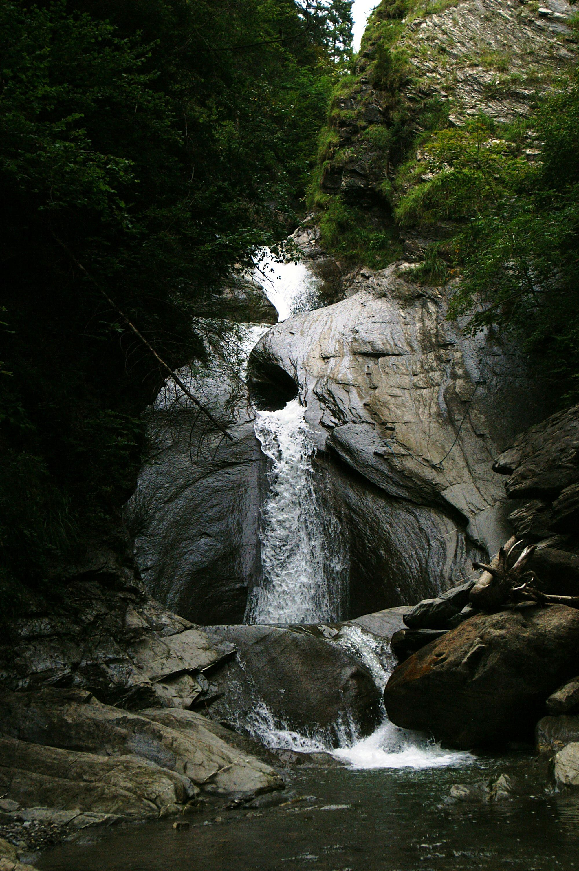 die Weiler-Kesselschlucht, Wasserfall des Ratzbachs in Vorarlberg